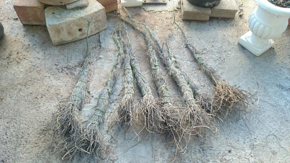 Manchos de esparto